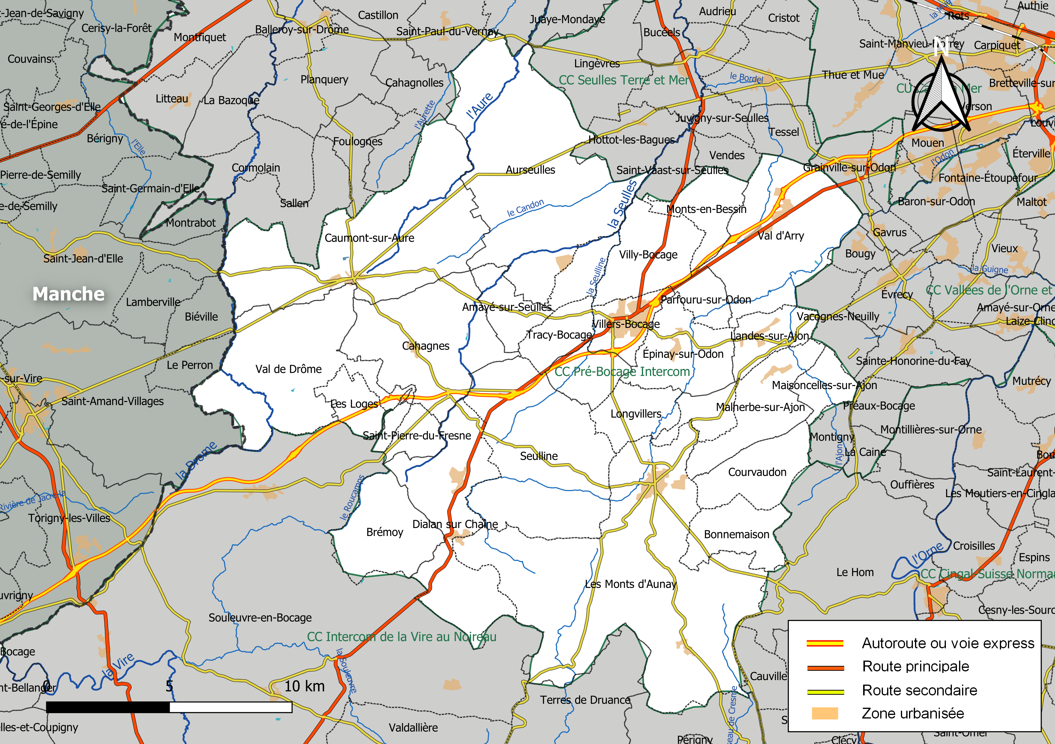 Carte géographique de la Communauté de communes Pré-Bocage Intercom, département du Calvados, France. Composition au 1er janvier 2019.